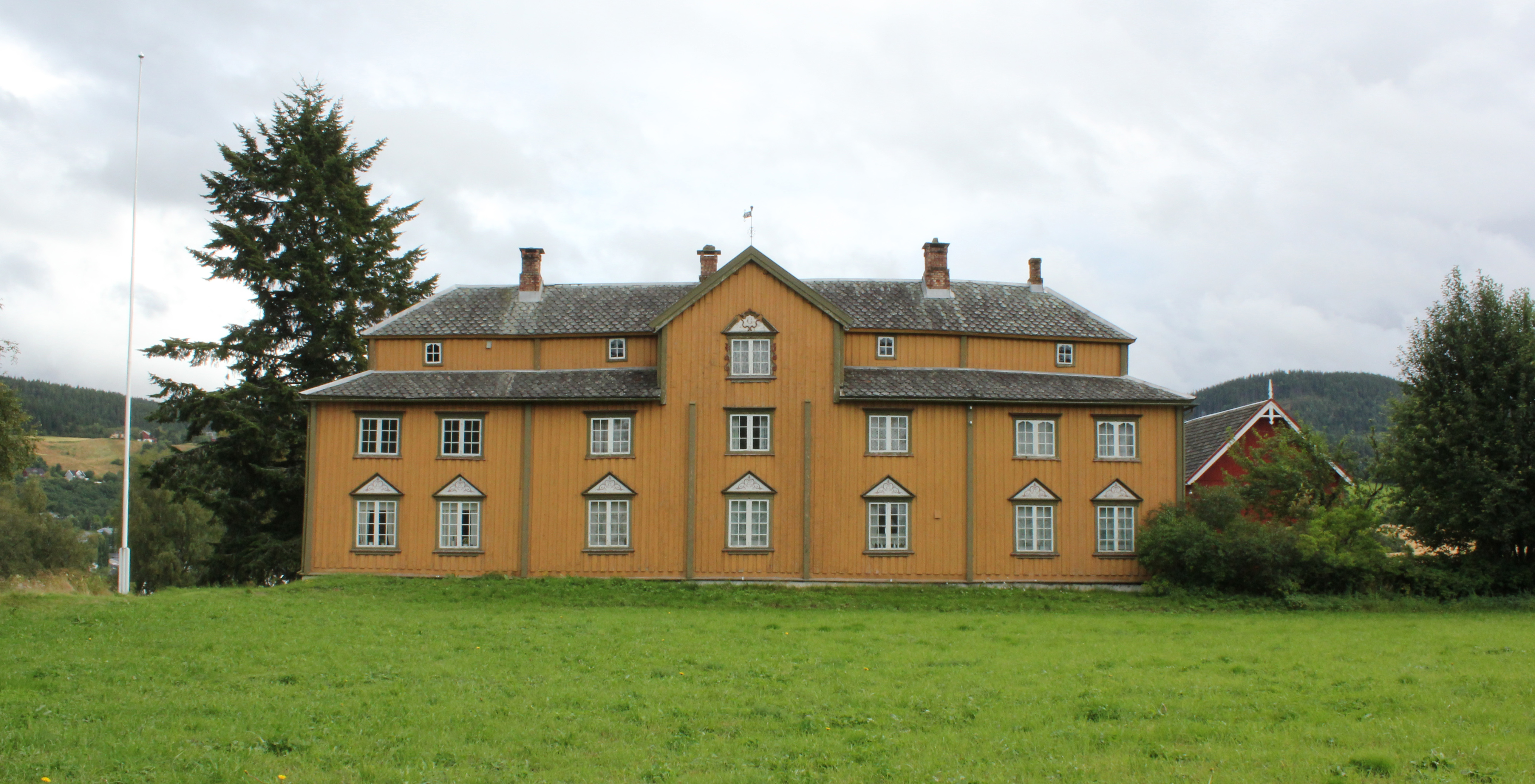 Gjesvold/Gjesvål gård, Orkdal. Hovedbygningen (1773) sett fra kirkegården ved Orkdal kirke, som ligger ca 150 m NV for gården